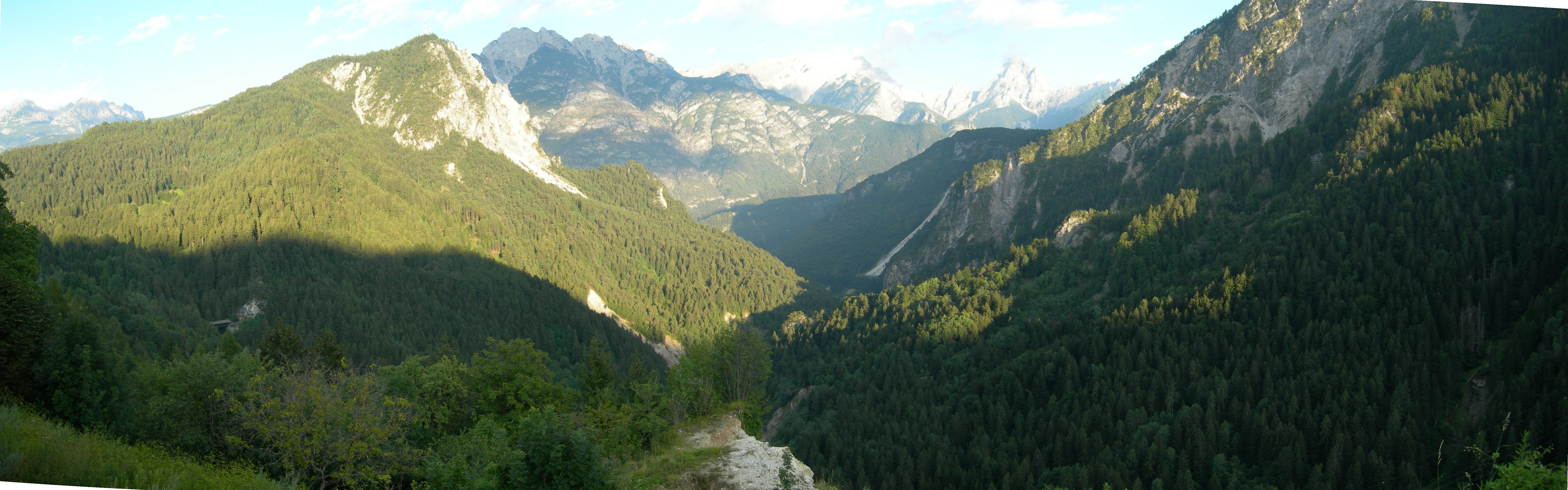 Perarolo di Cadore (Italia). Valle dove il fiume Boite si immette nel fiume Piave. Fotografia scattata dalla chiesa di Valle di Cadore (vedi riferimento geografico sotto riportato).